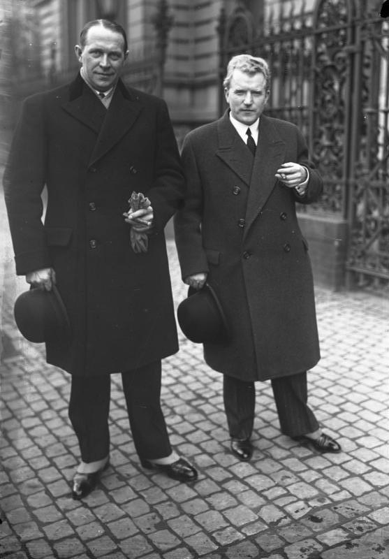 Die Memelfrage vor dem Völkerbund ! Die beiden litauischen Vertreter Dr. Zaunius (links) und Sidsikauskas (rechts), welche sich wegen des Memel-Confliktes vor dem Völkerbund zu verantworten haben.